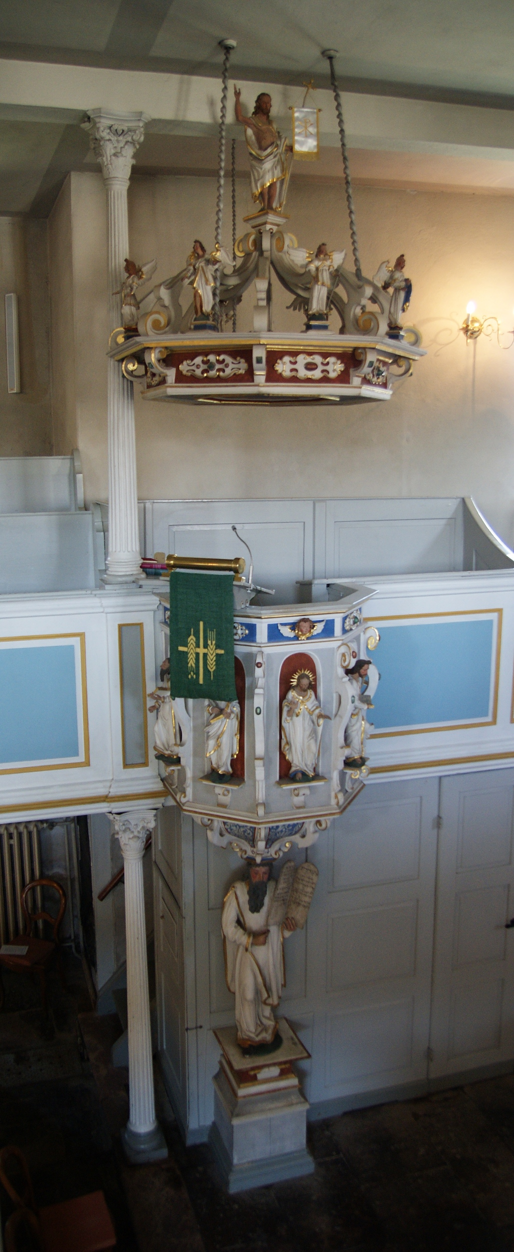 Kirche Großolbersdorf, Kanzel